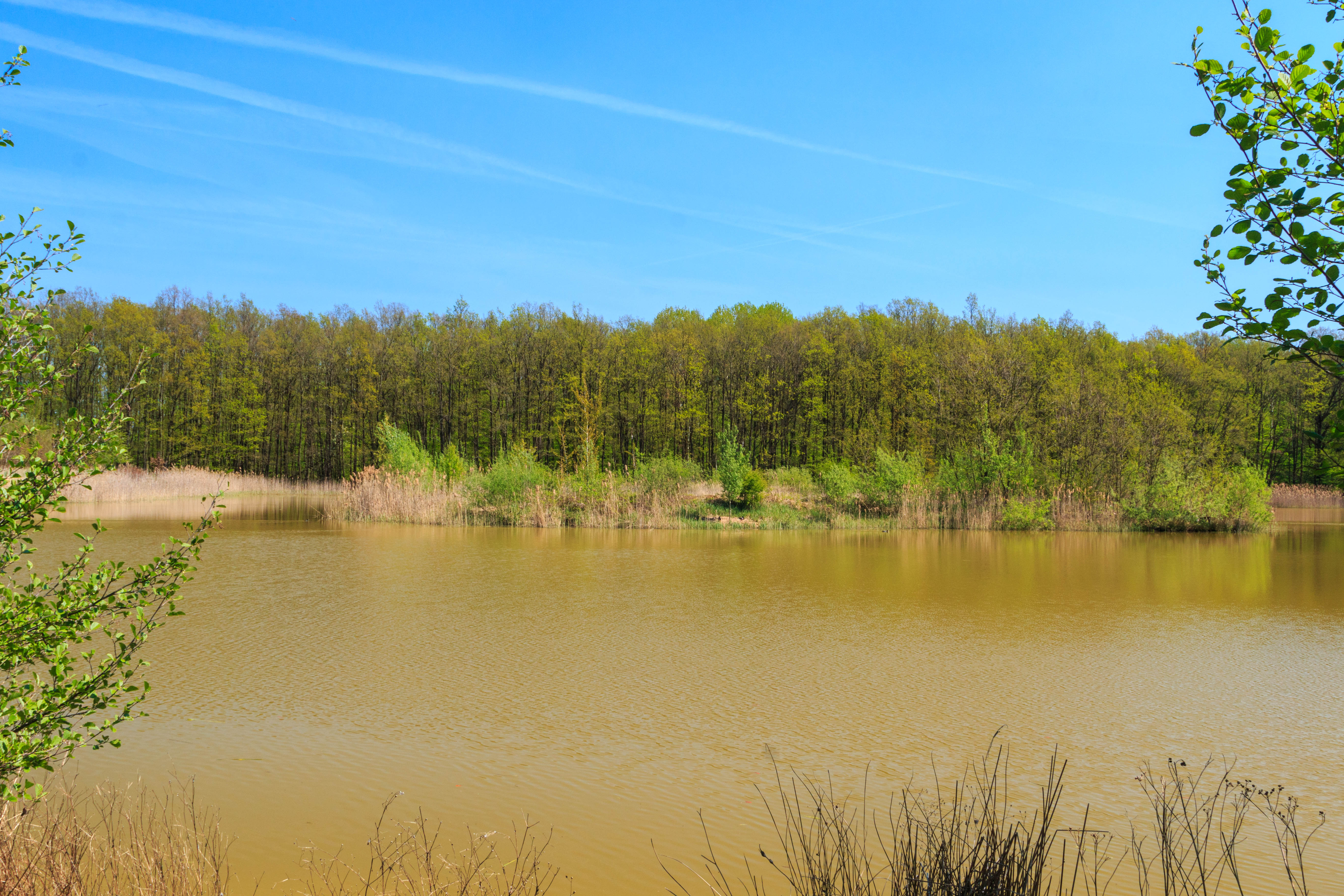 Rybník Řasov u obce Kobylice Project: Vodstvo.